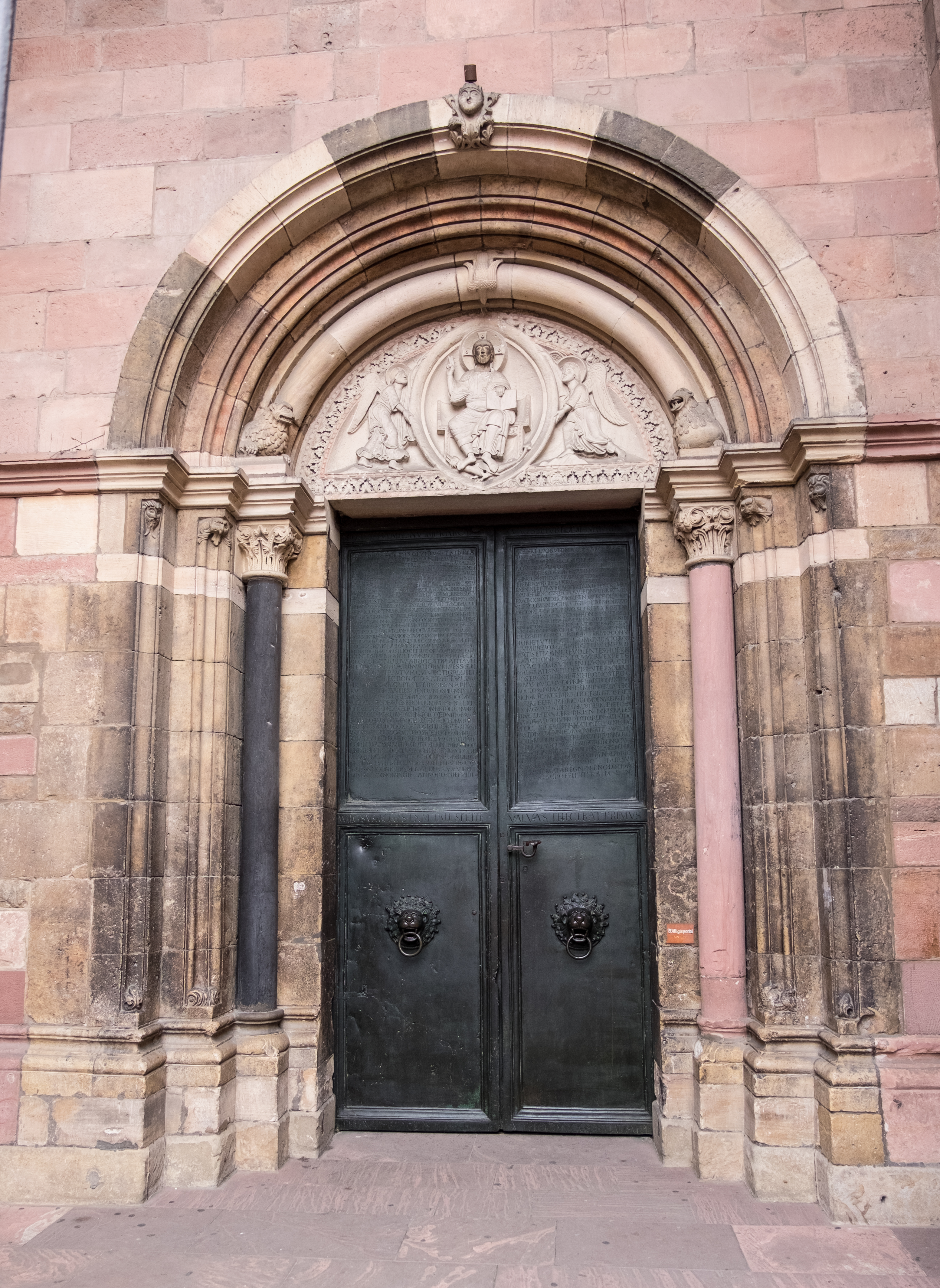 Willigisportal (Marktportal) des Mainzer Doms